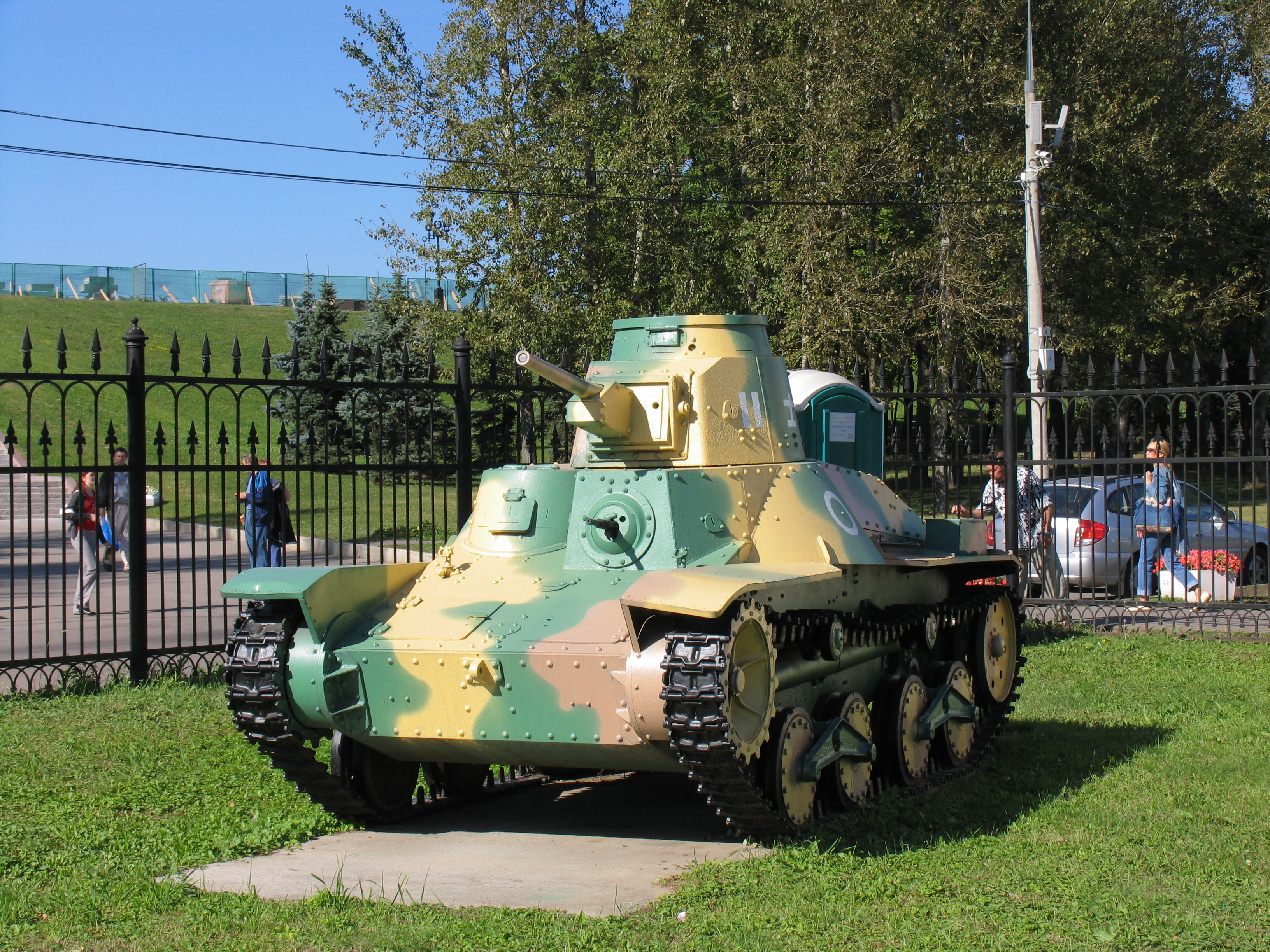 Ha-Go Moscow